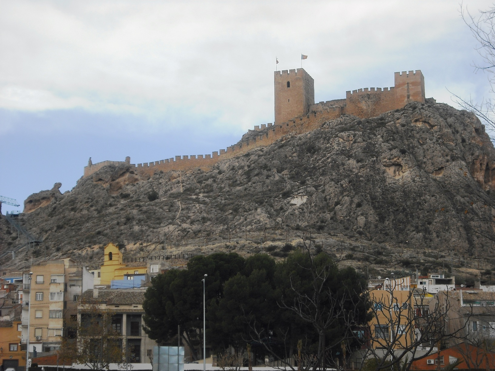 Vista de Sax.